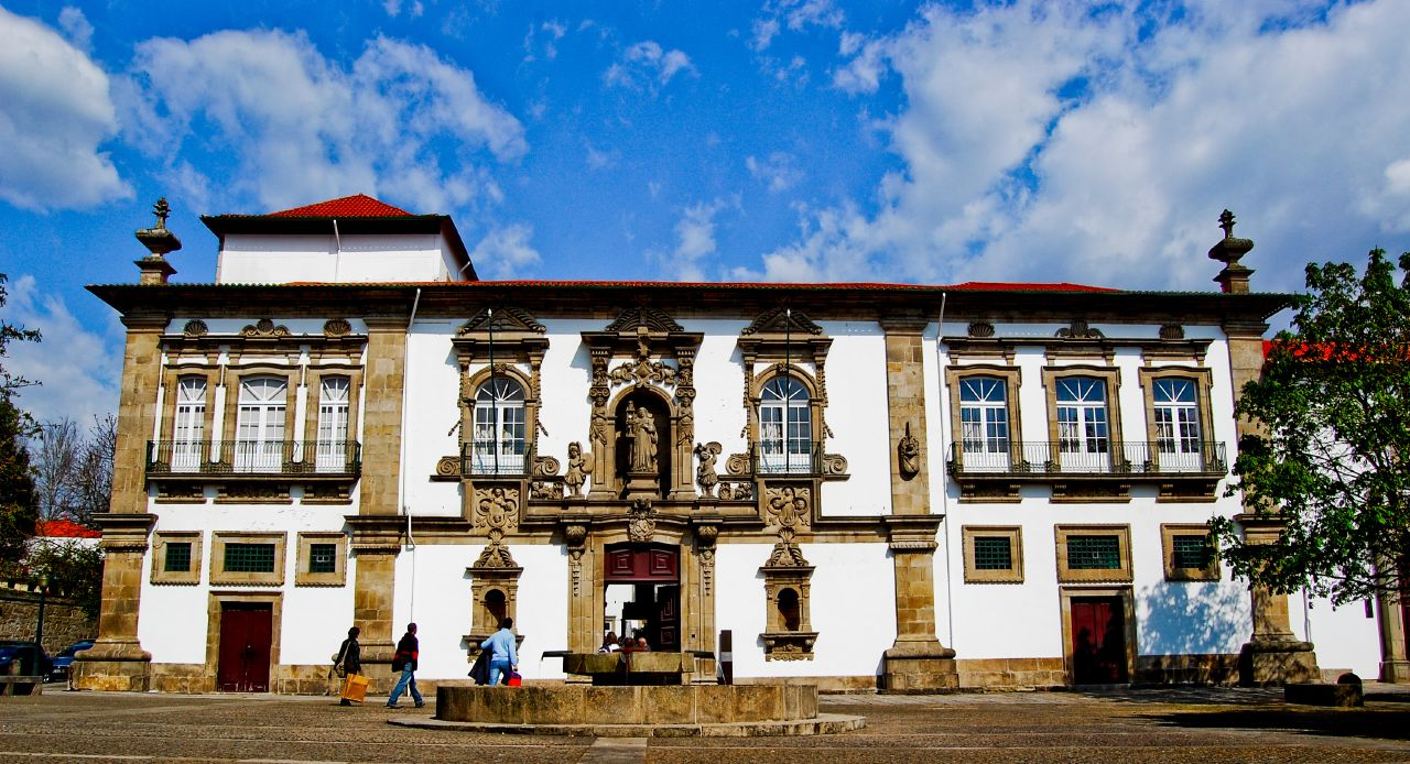 Edifício da Câmara Municipal, antigo Convento de Santa Clara, Guimarães, Portugal.